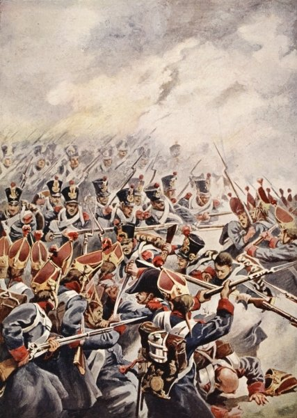 La division Suchet à Austerlitz, le 2 décembre 1805. Cette division participe aux affrontements sur la partie nord du champ de bataille, face au corps russe du prince Bagration.